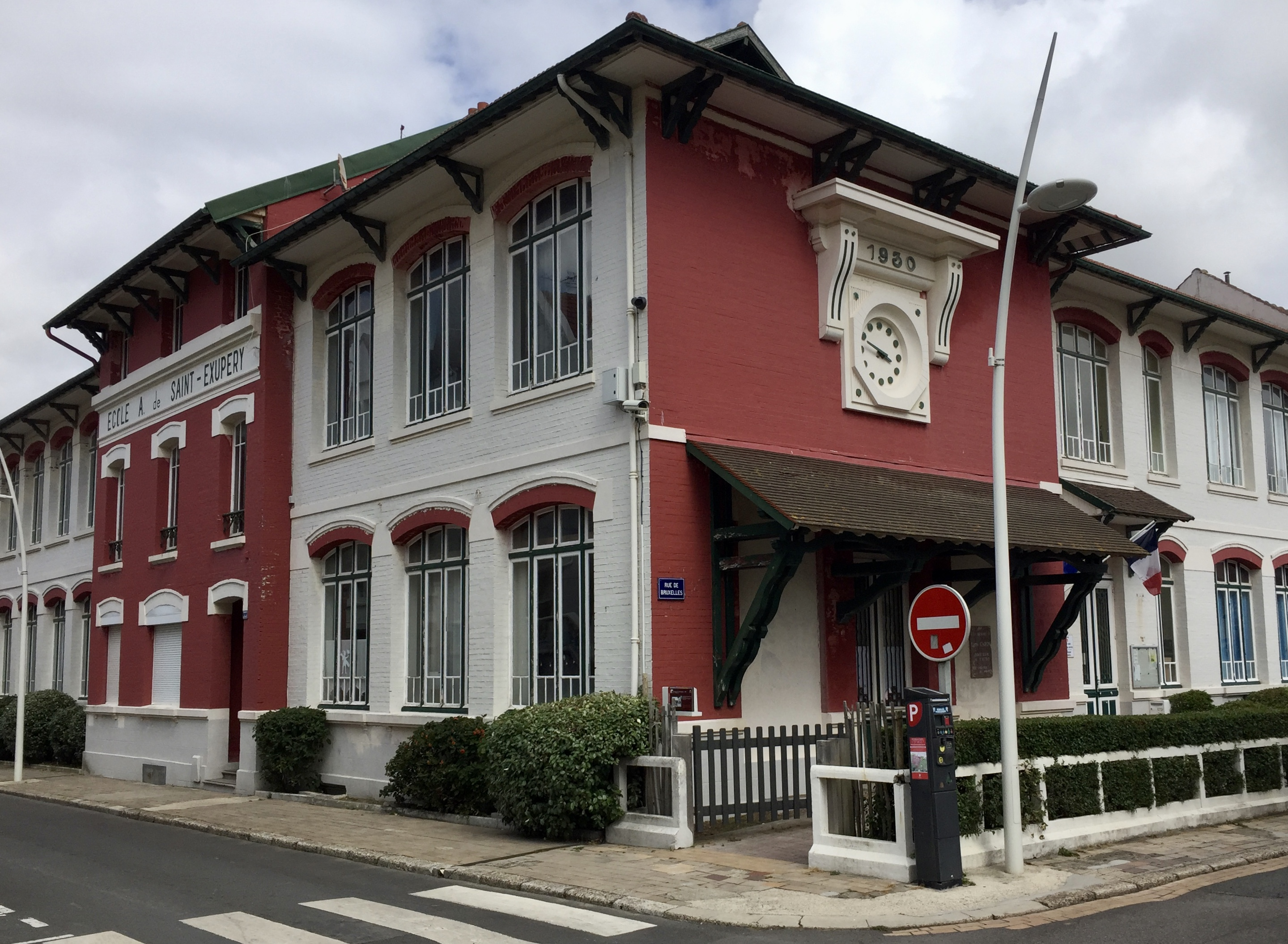 École des garçons "collège Antoine de Saint-Exupéry" angle nord-est des rues de Moscou et de Bruxelles Le Touquet-Paris-Plage